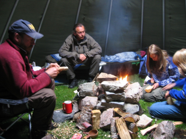 Under oppkjøringen til Steigen sagaspill. Åsen-lavvoen Bilde tatt av Lill Marit Åsen med Bruker:ThorRune's kamera.